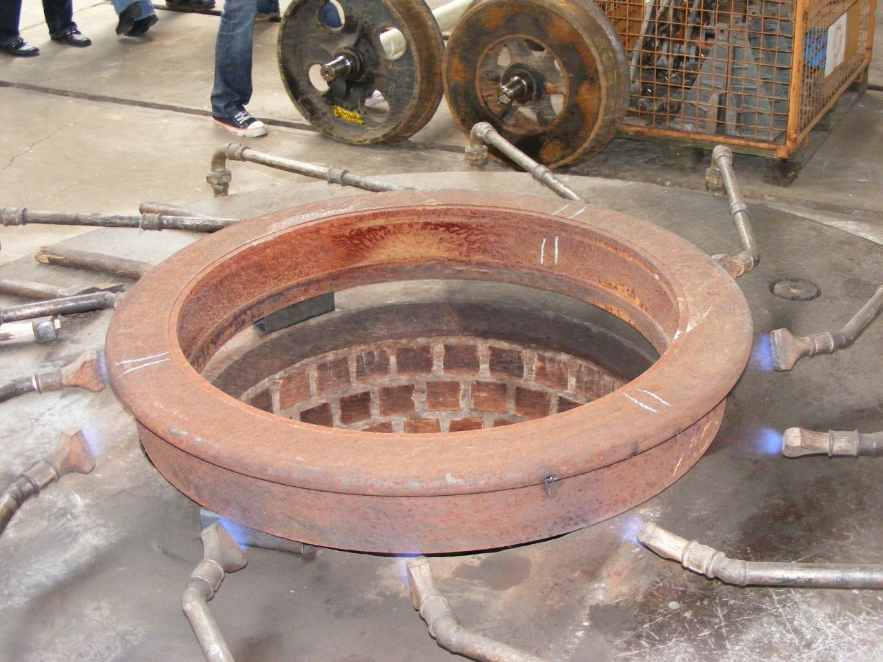 Gasbeheizte Einrichtung zum Erwärmen von Radreifen vor dem Aufziehen bei der WLE